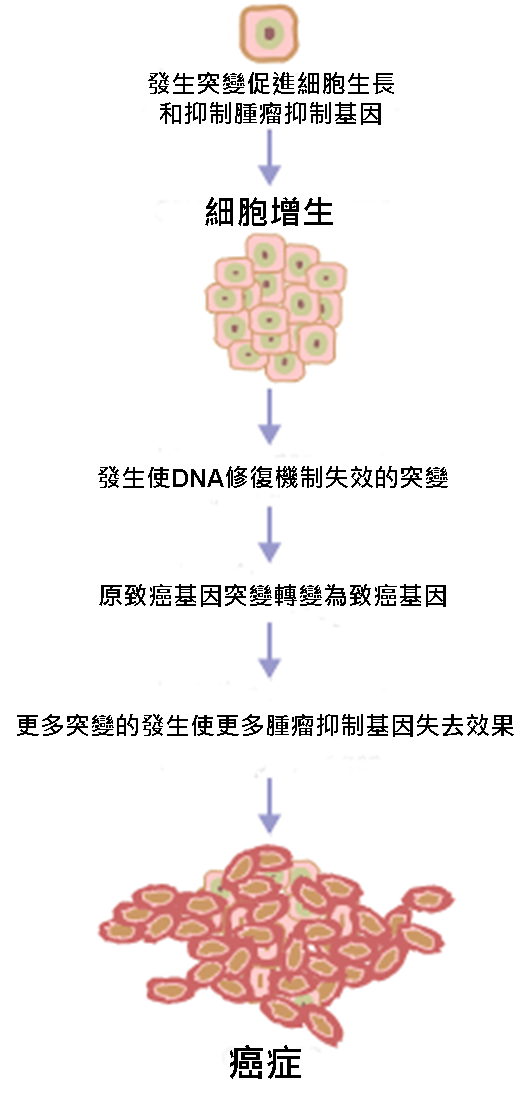 ગુજરાતી: શરીરમાં થતાં શ્રેણીબદ્ધ પરિવર્તનોને કારણે કર્કરોગ થાય છે.દરેક પરિવર્તન કેટલાક અંશે કોશિકાના વર્તનને સજાગ કરે છે. કે ચેતવણી આપે છે.